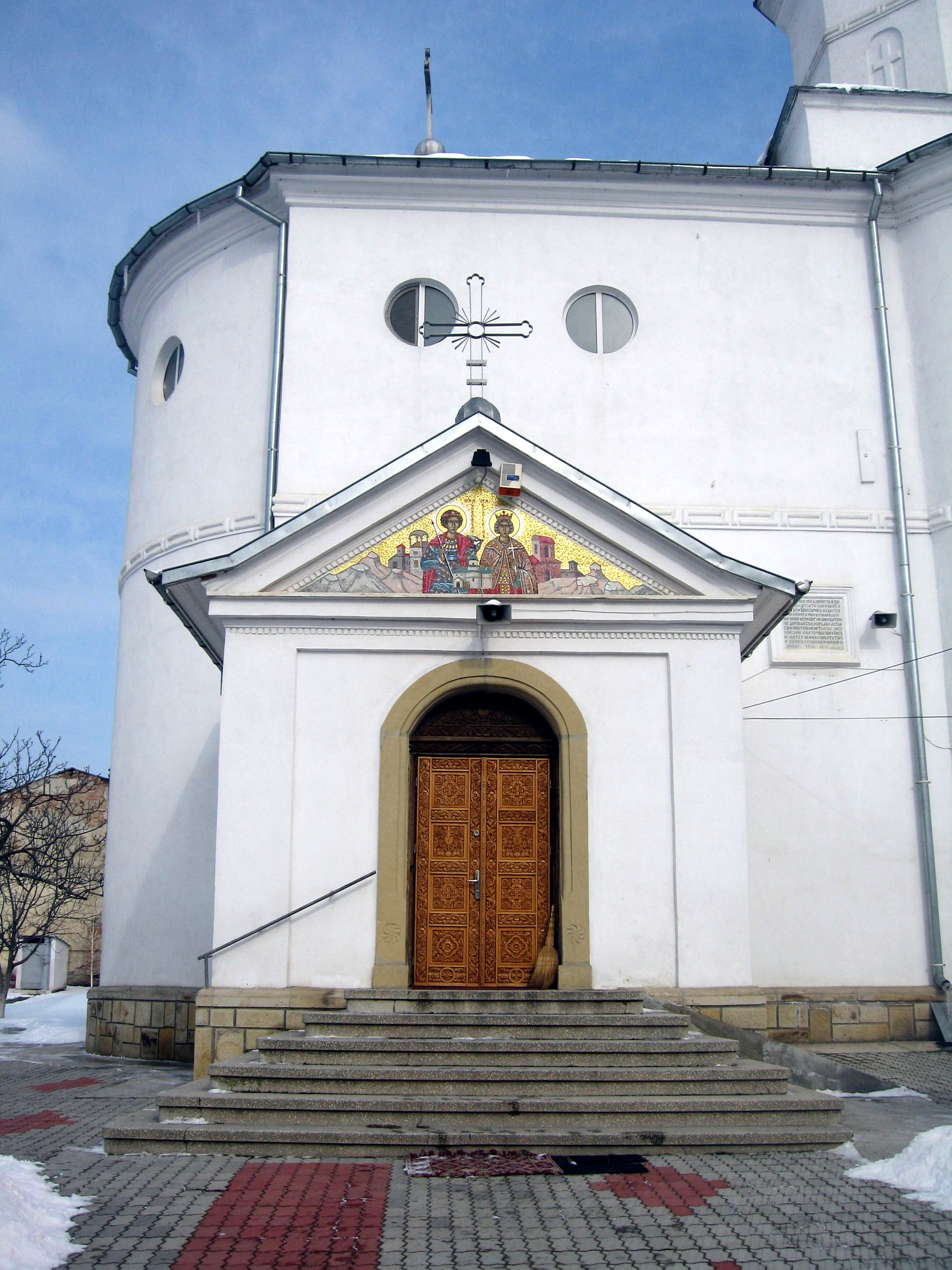 Biserica Sf. Gheorghe Lozonschi din Iași